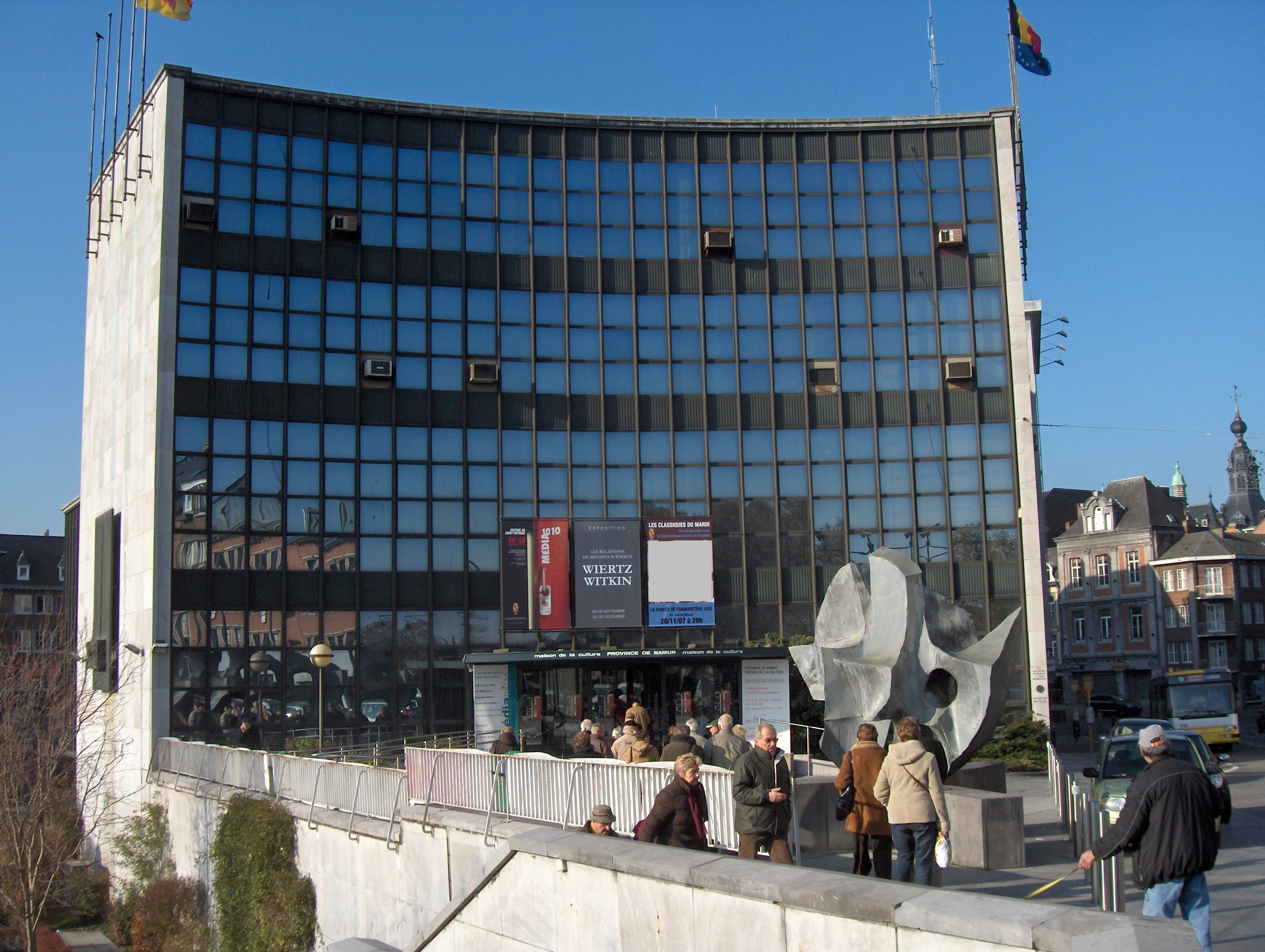 Centre culturel, Namur, Belgium